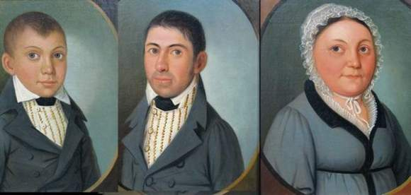 Johann Schlesinger, Barbara und Jacob Louis und ihr Neffe Valentin Heuser